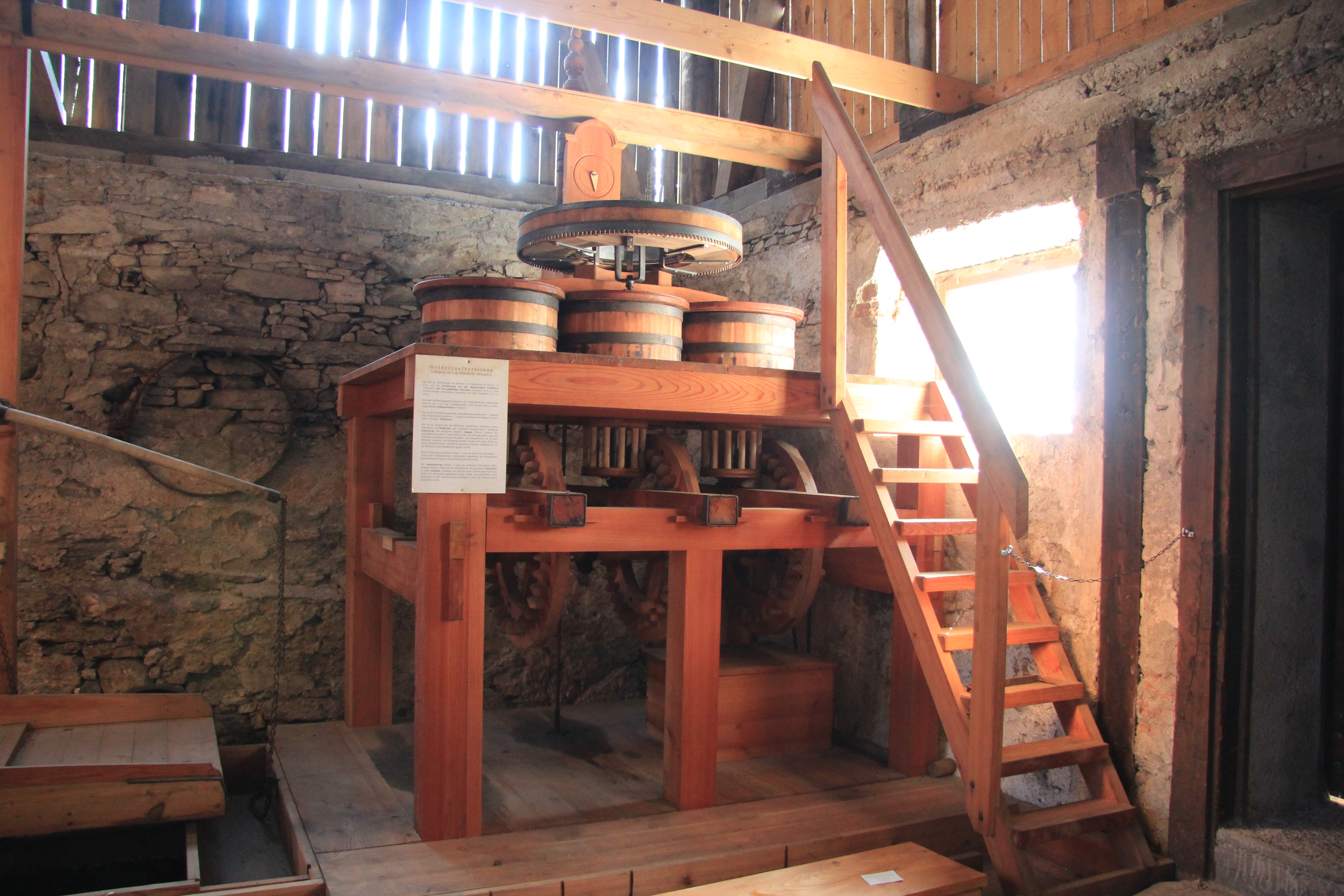 Nachbau einer Amalgamierungsanlage im Montanmuseum Altböckstein